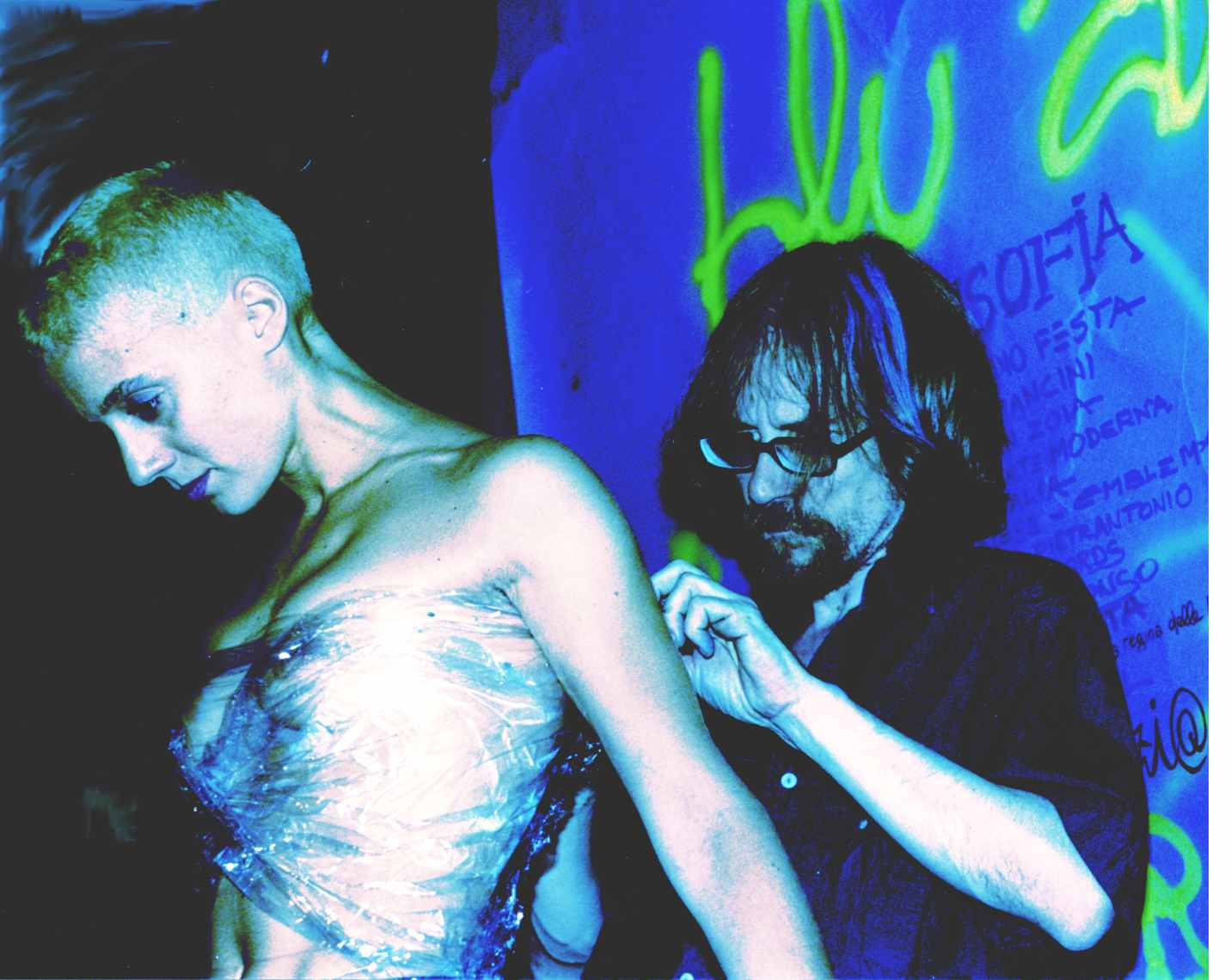 La danzatrice Sabrina Camera in performance con Norman Zoia nel contesto della Blu Age e della Blusofia